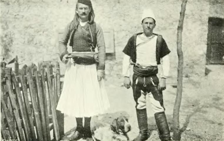 Nativo de Scutari y albanés, hacia 1904.